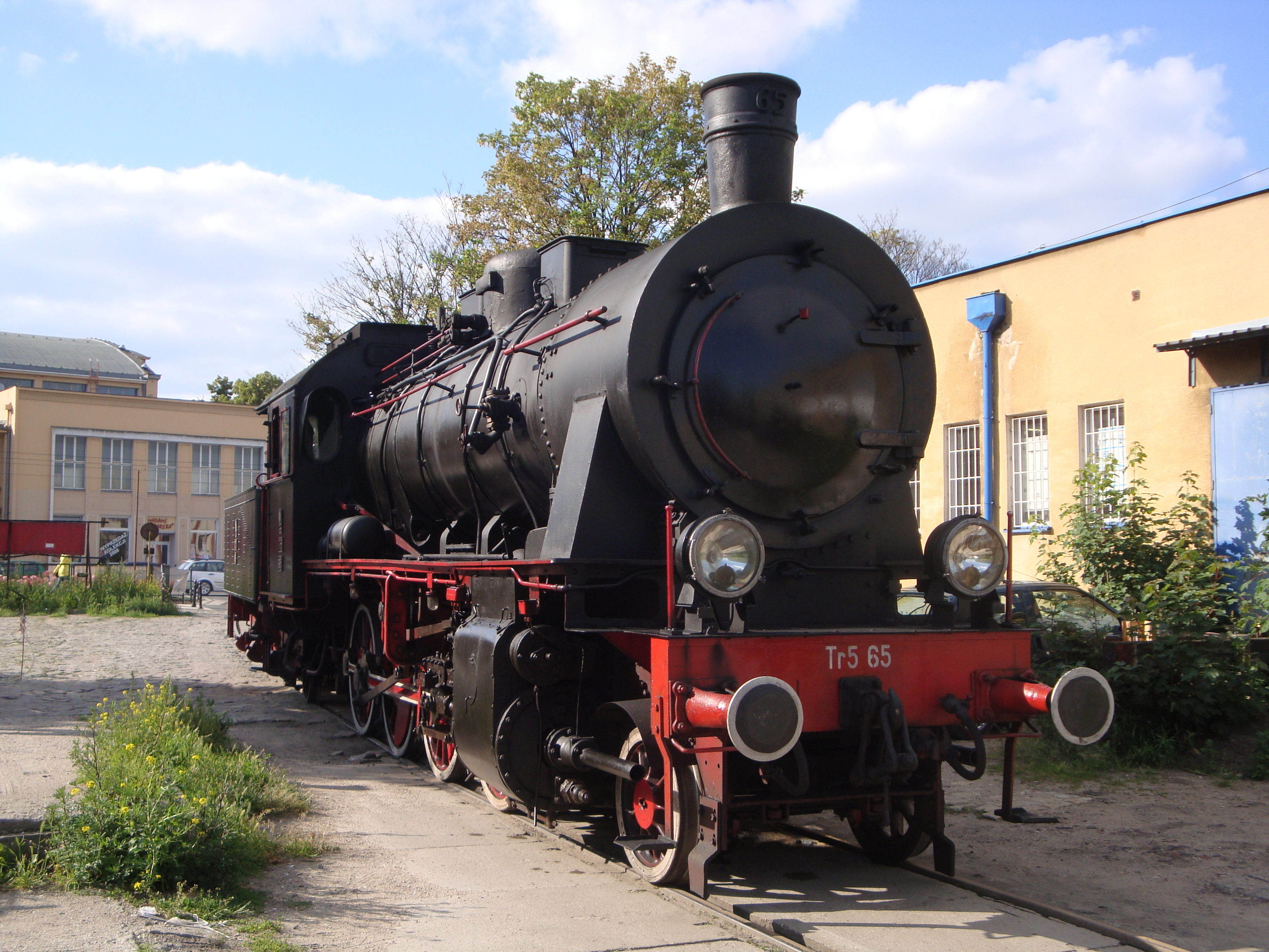 Parowóz Tr5 podczas wyjazdu z bocznicy Międzynarodowych Targów Poznańskich.